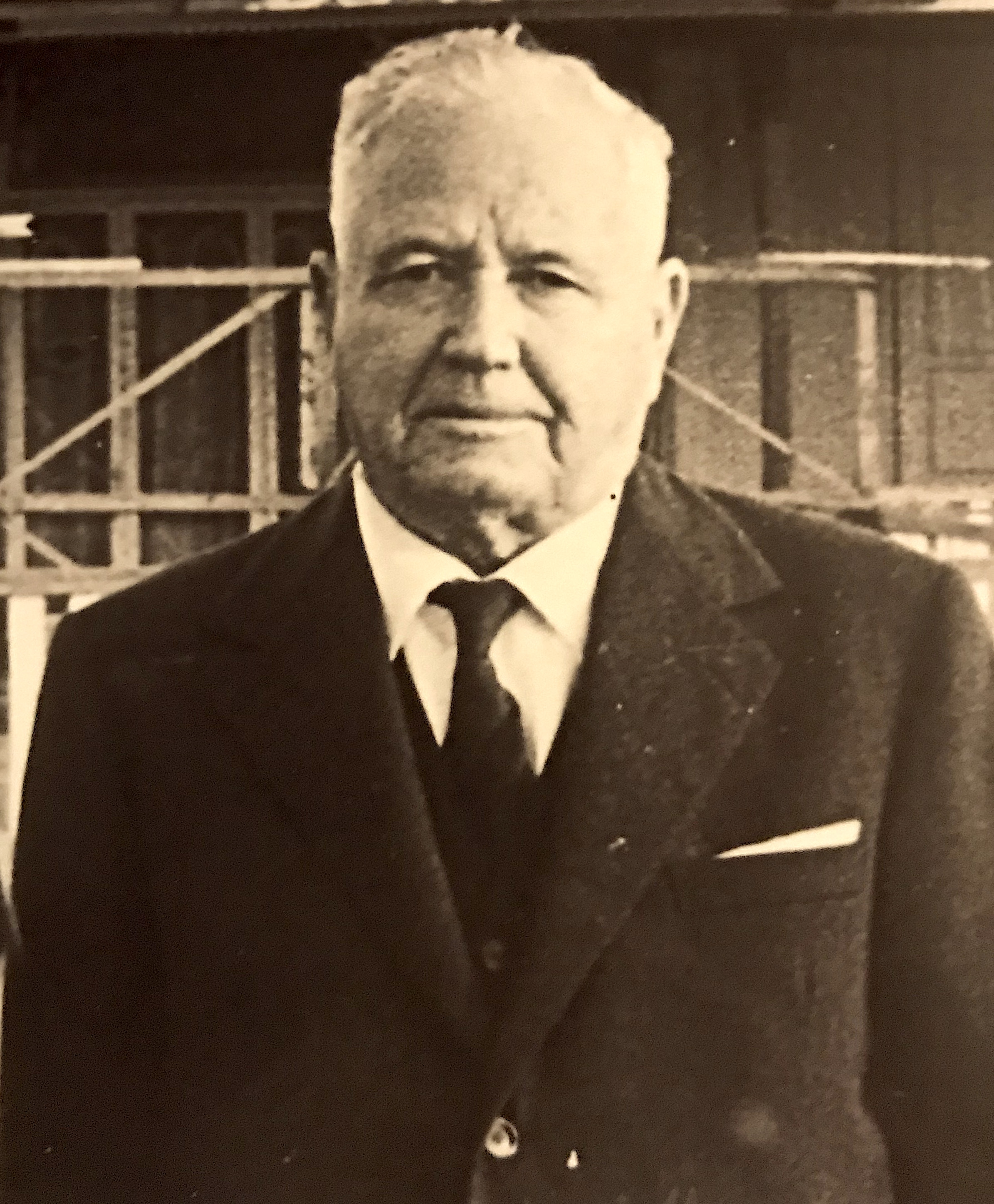 Fotografia di Giacomo Vuxani negli anni '50